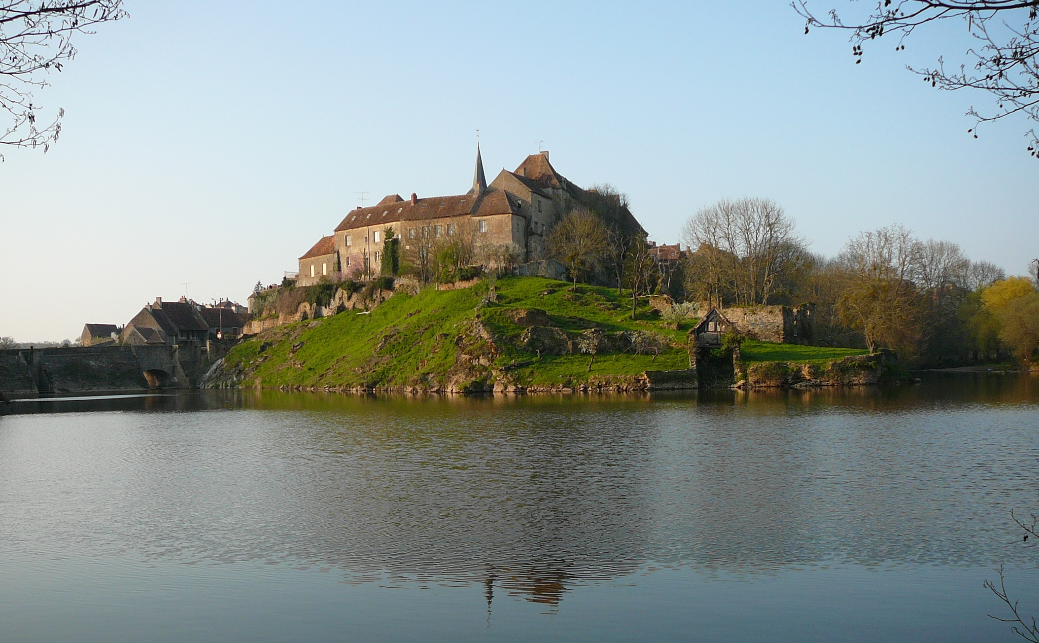 saintbenoitdusault1.jpg